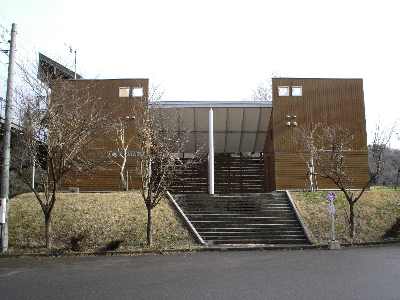 大池いこいの森駅